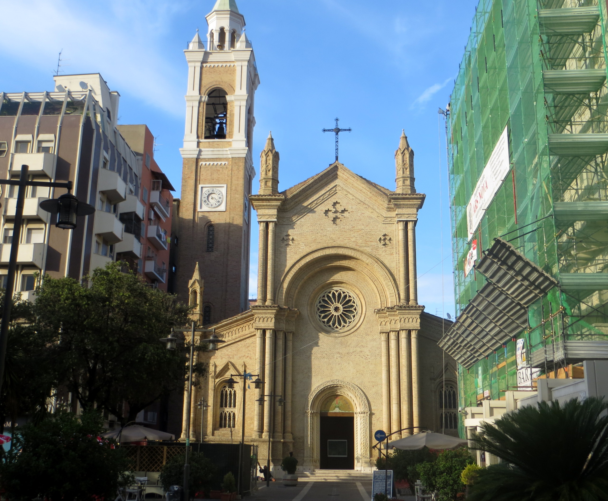 Chiesa del Sacro Cuore a Pescara